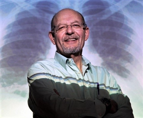 אלישע בר מאיר